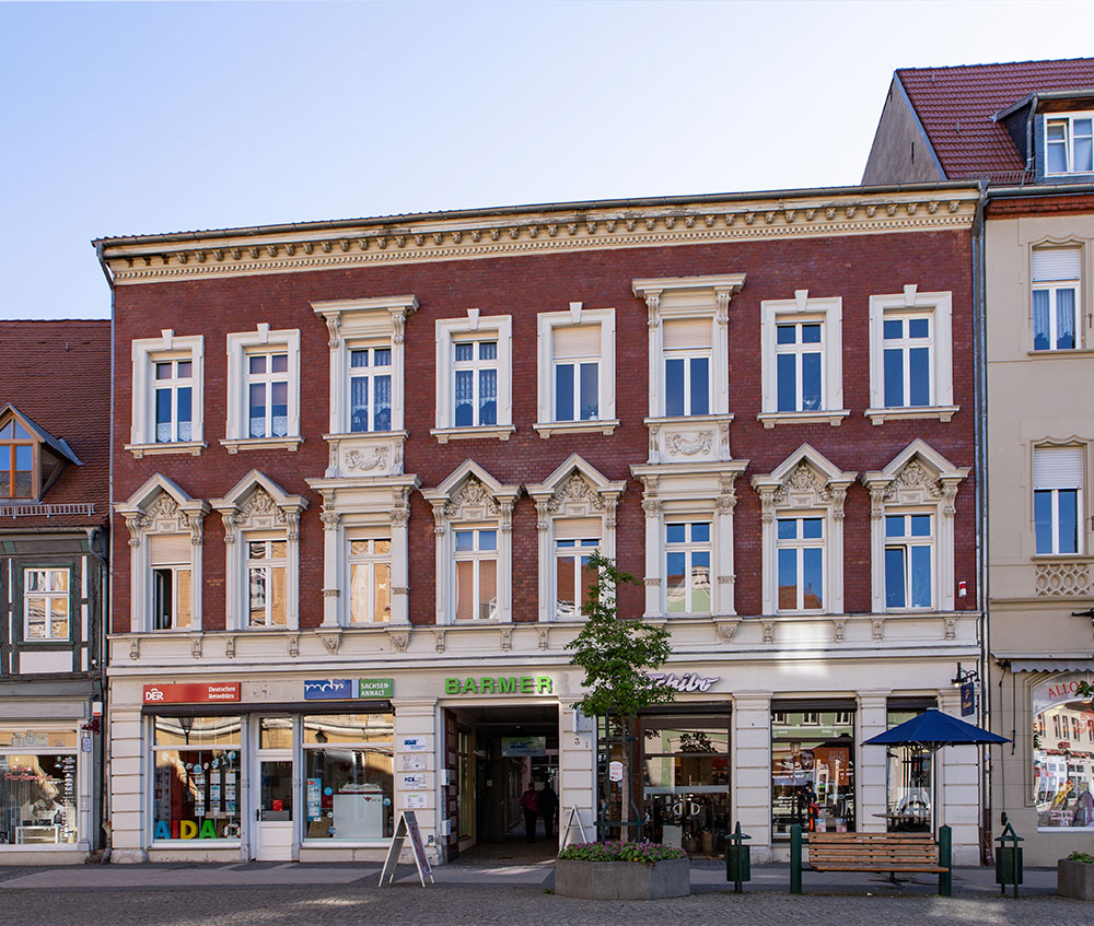 Stendal Breite Straße 3, frühere Druckerei Franzen und Grosse (Altmärkisches Intelligenz und Leseblatt), Baudenkmal